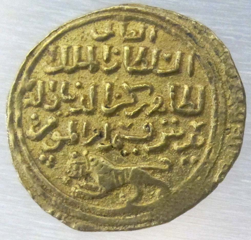 Egitto, califfo al baybars, dinar mamelucco, 1260-1277